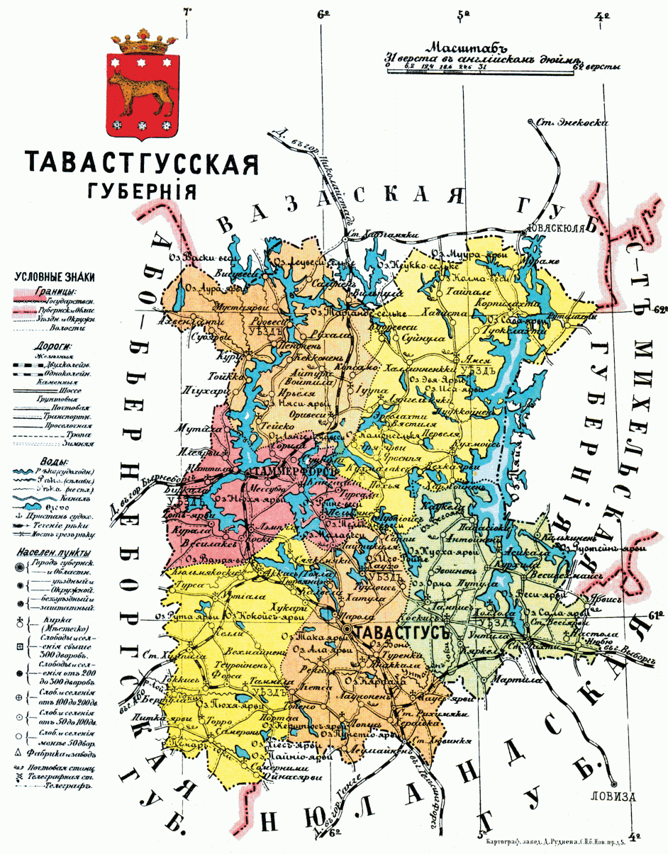 Карта Тавастгусской губернии Великого княжества Финляндского, 1913